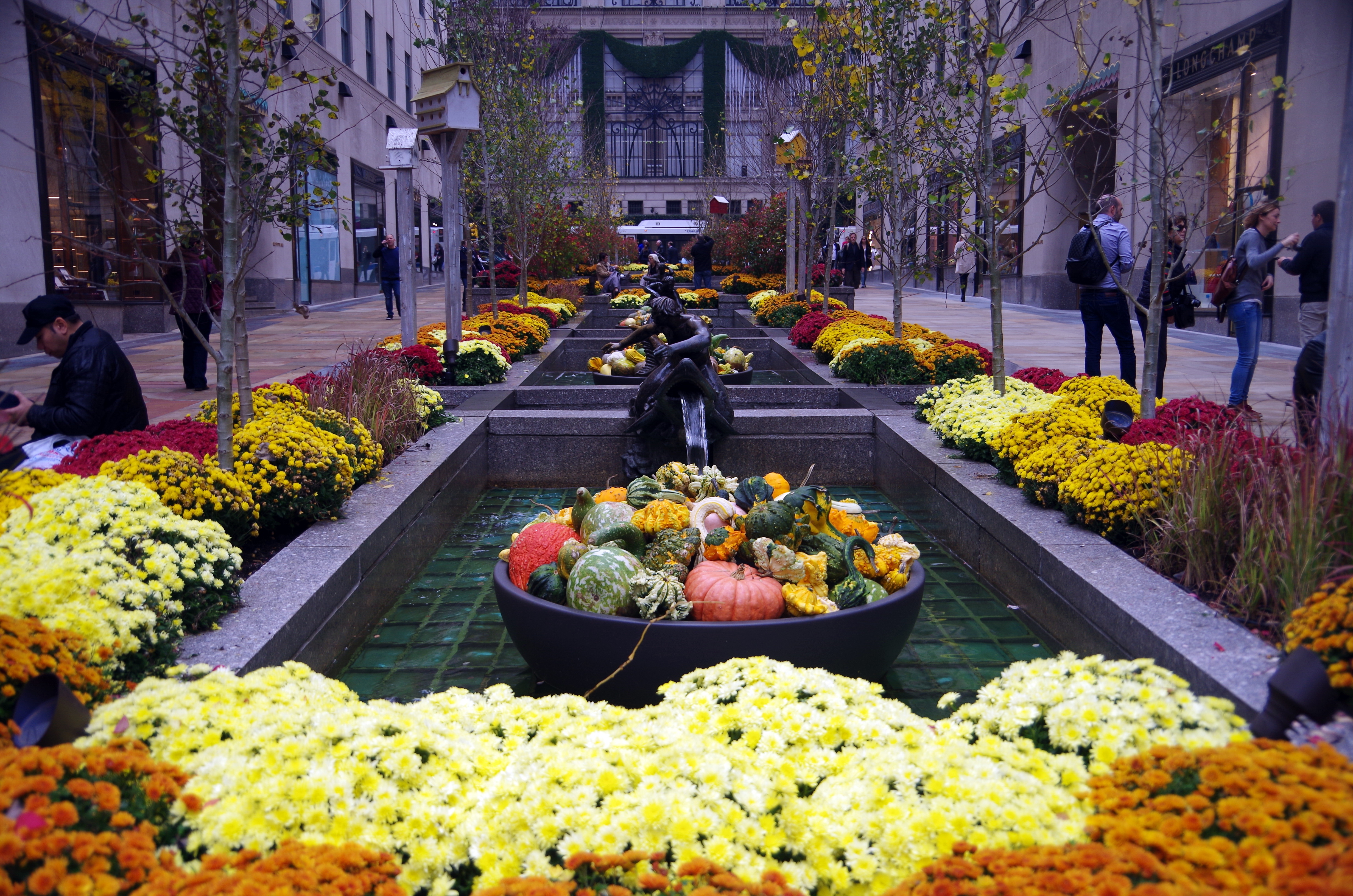 Am Rockefeller Center